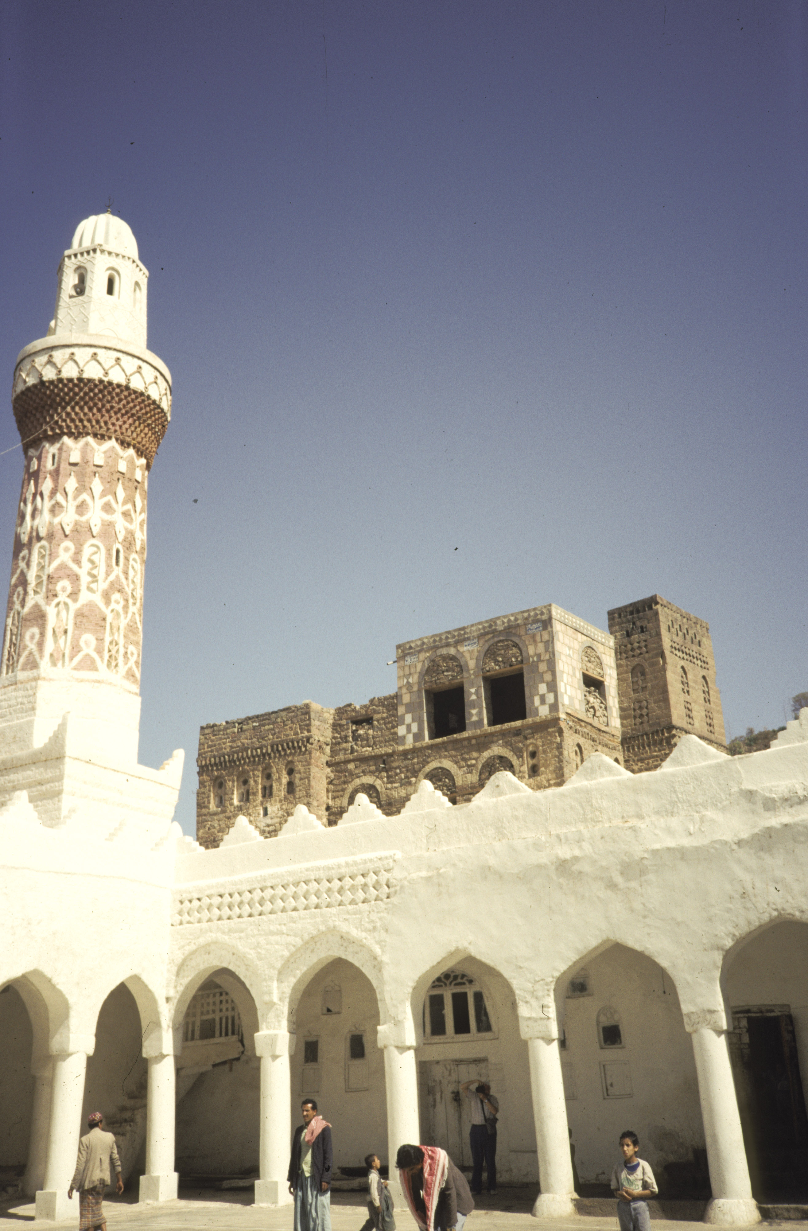 Yemen